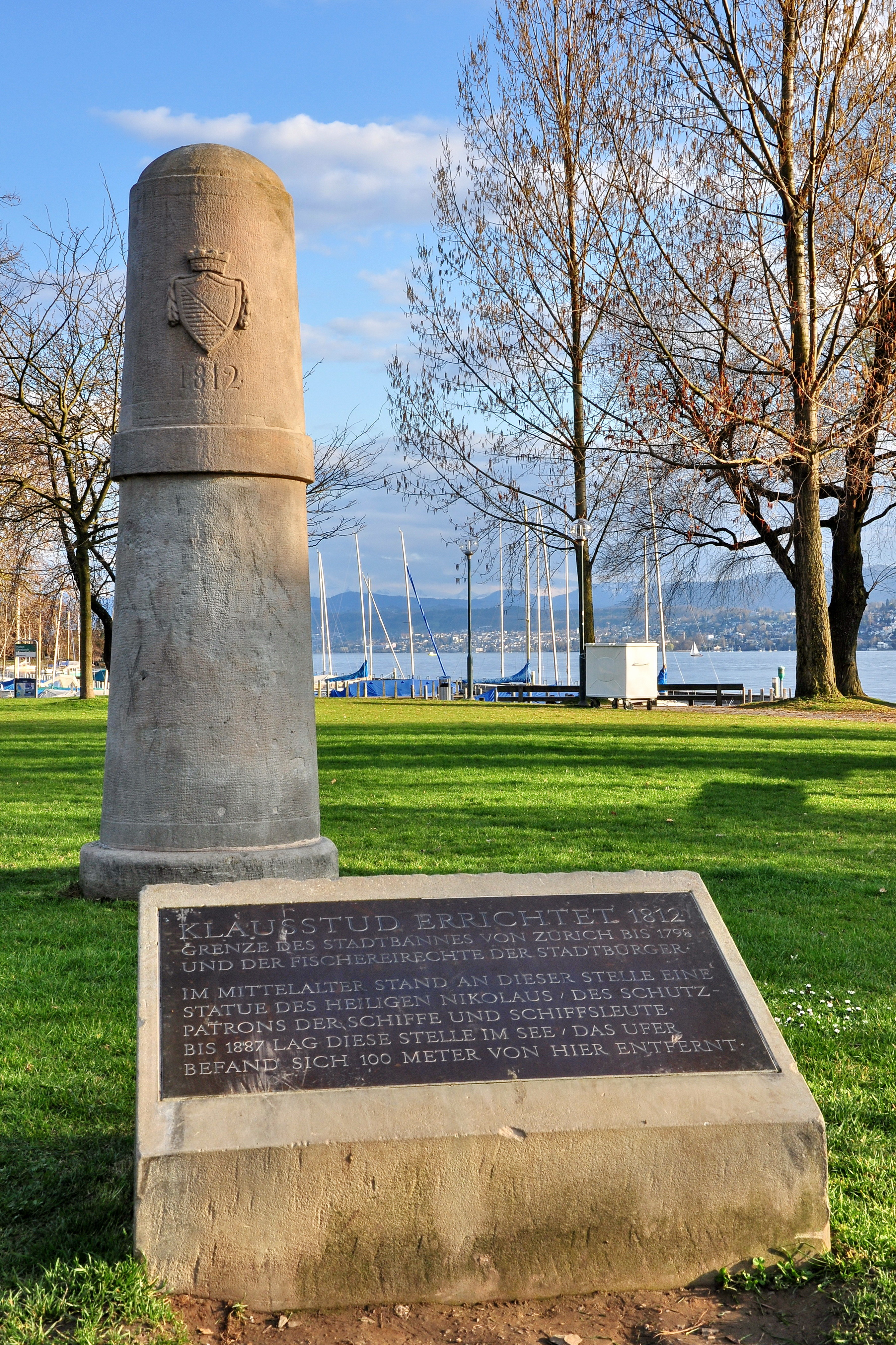 Klausstud in Zürich-Seefeld (Hafen Riesbach) (Switzerland)Klausstud errichtet 1812Grenze des Stadtbannes von Zürich bis 1798und der Fischerreirechte der Stadtbürger.Im Mittelalter stand an dieser Stelle eineStatue des Heiligen Nikolaus - des Schutz-patrons der Schiffe und Schiffsleute.Bis 1887 lag diese Stelle im See, das Uferbefand sich 100 Meter von hier entfernt.